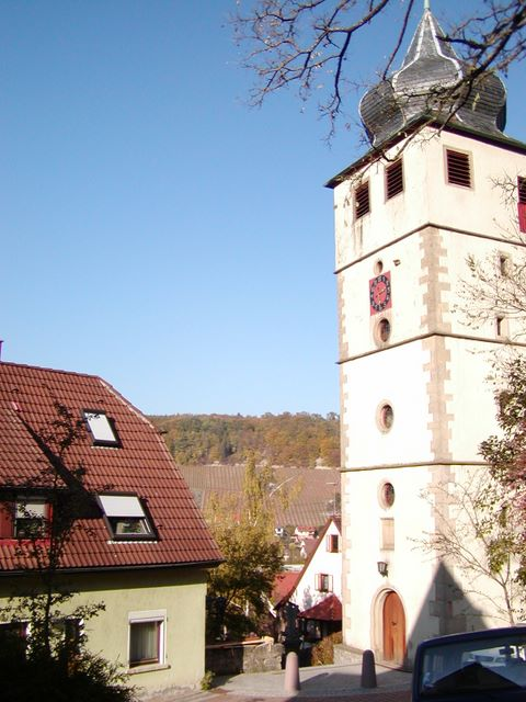 Neue Kirche, Forchtenberg